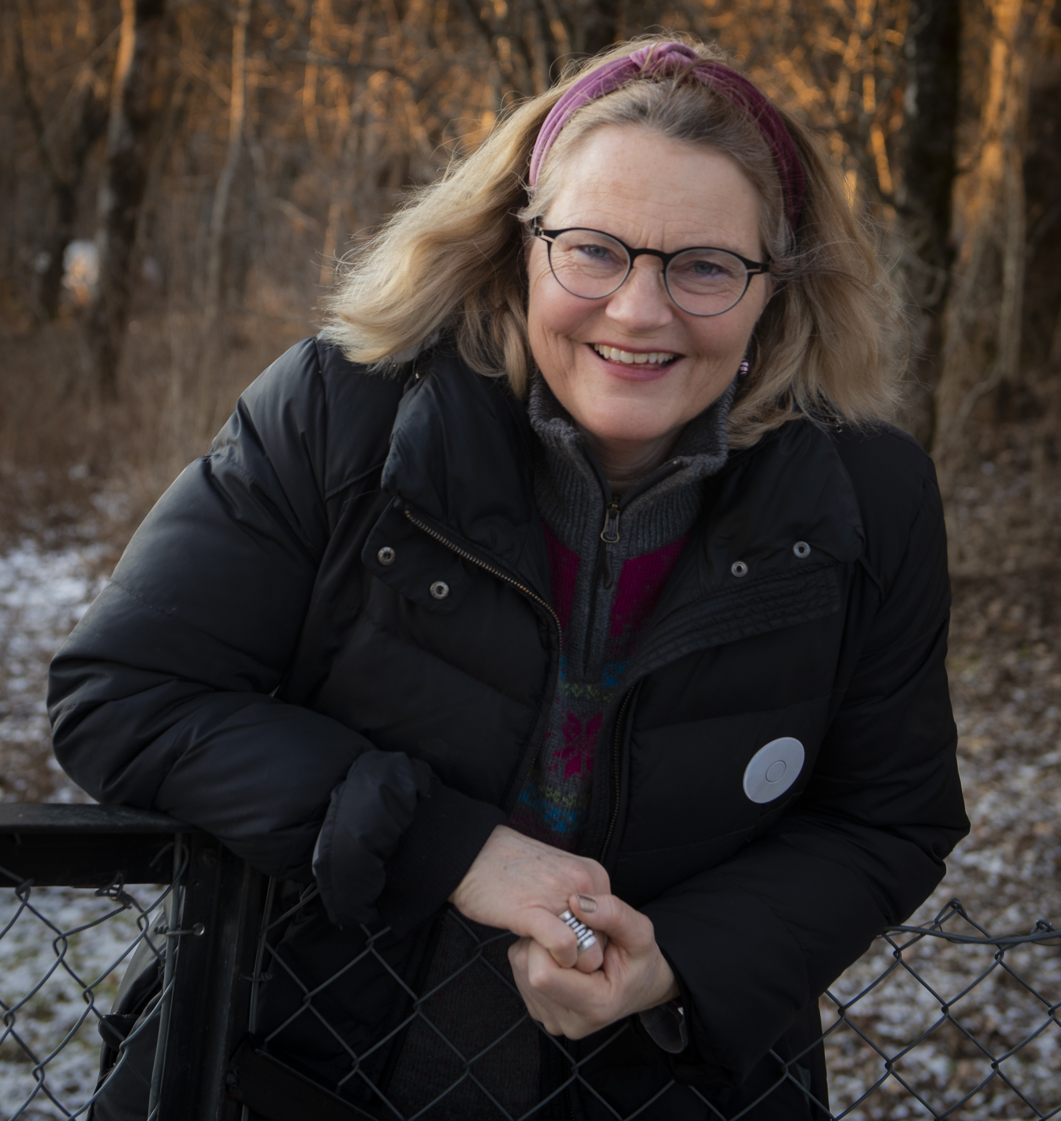 Depicted person: Hilde Vesaas